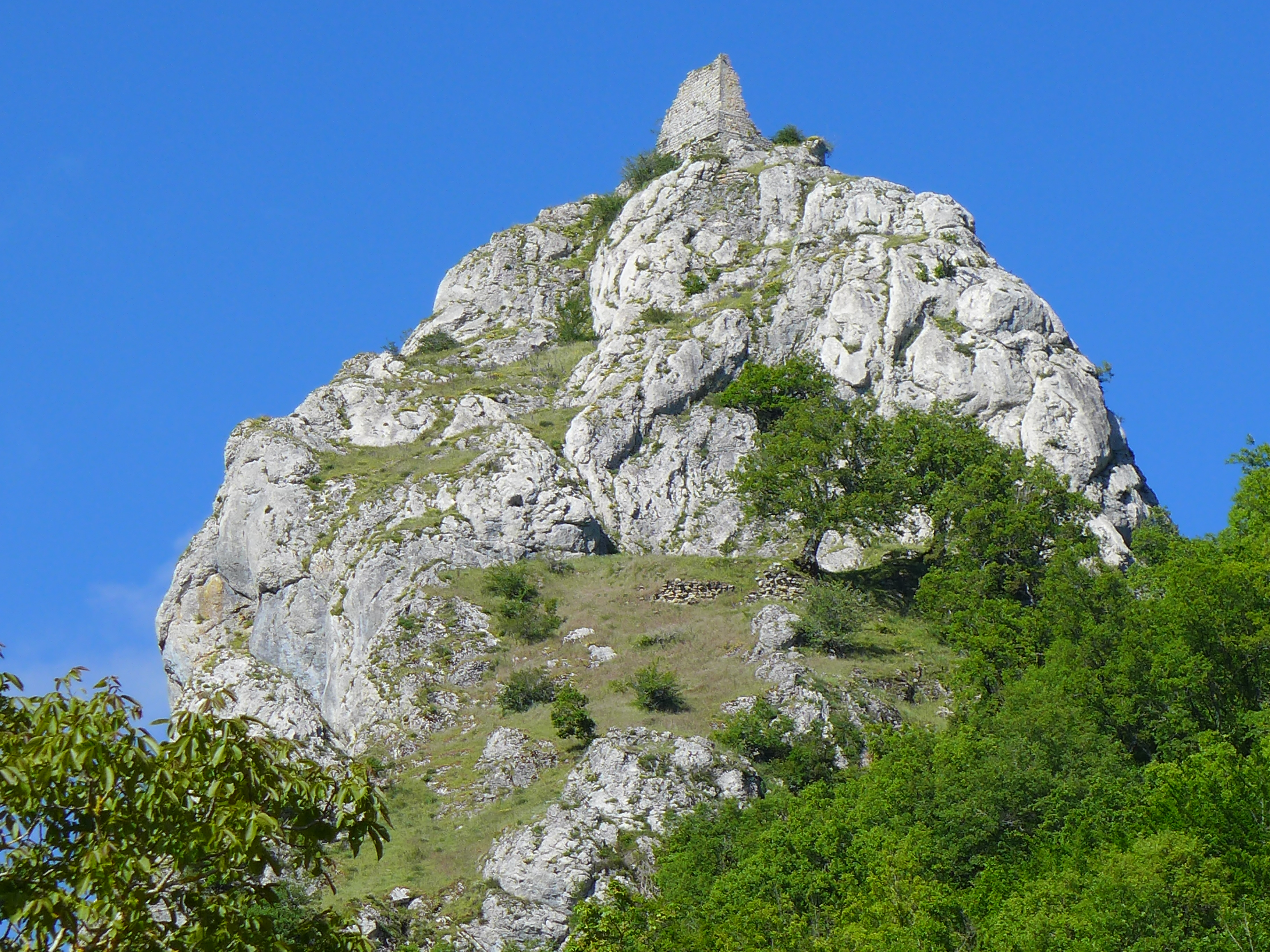 Sierra de Urkilla. Zoom de la Peña Marutegi con restos del castillo desde el Caserio Marutegi